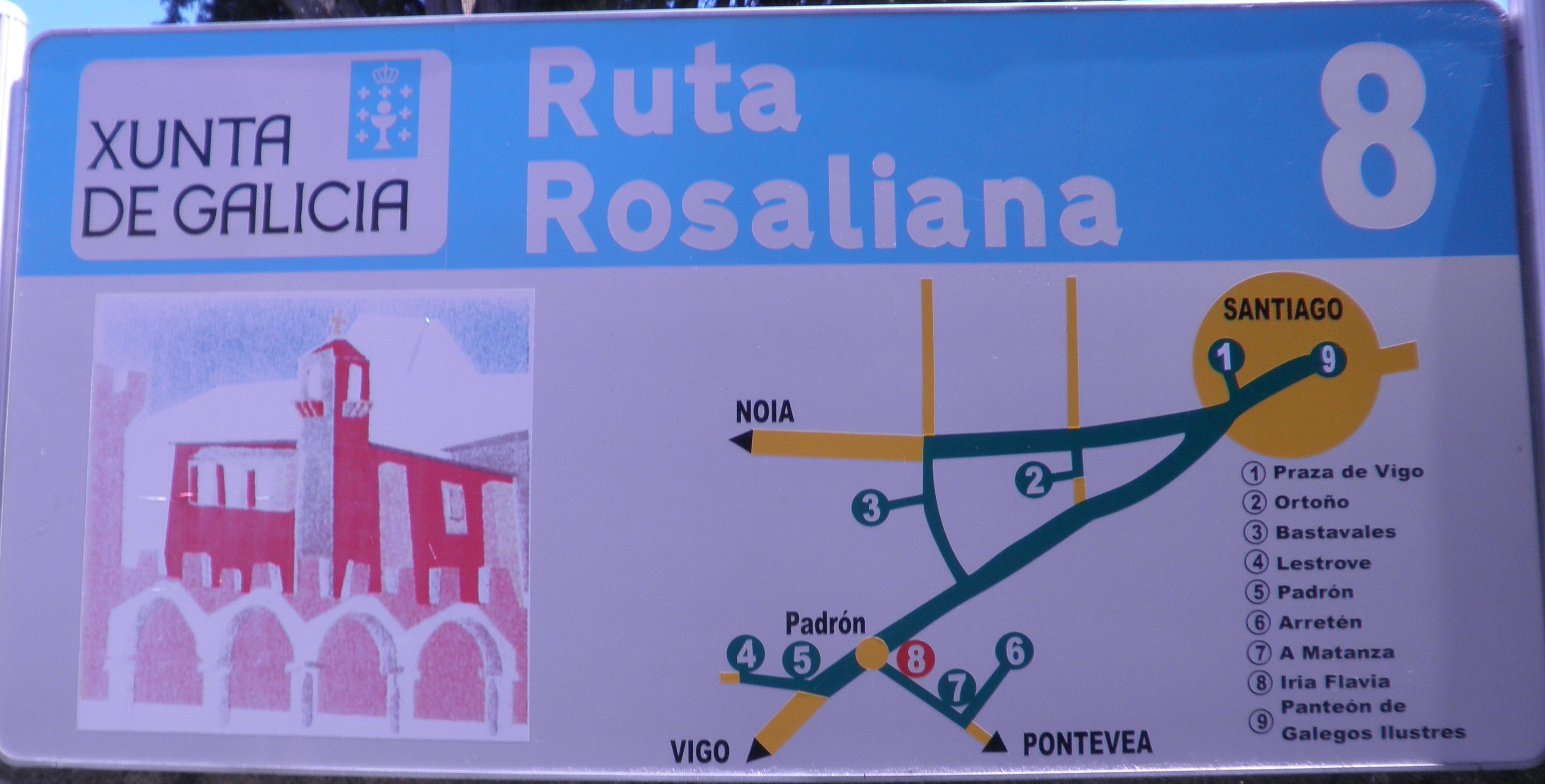 Letreiro co plano da Ruta Rosaliana en Iria Flavia, Padrón.